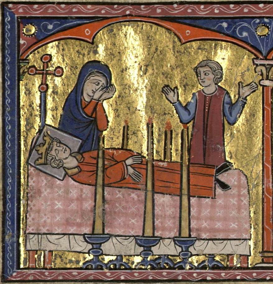 Mort de Foulque de Jérusalem